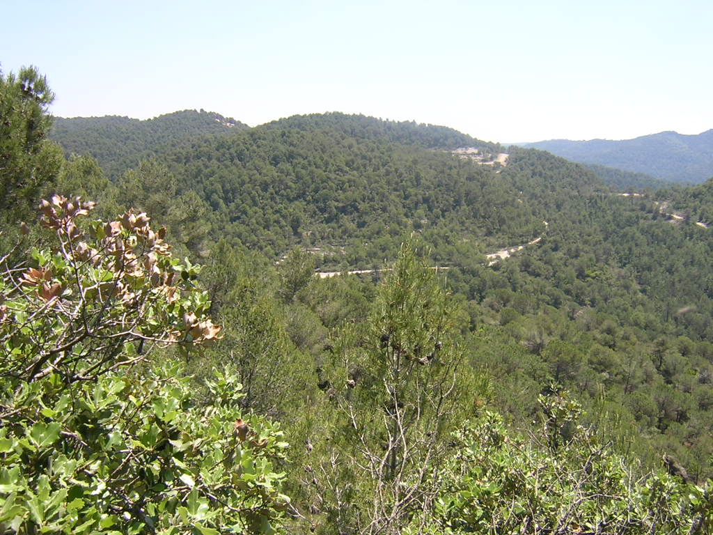 Bosc Mitger (Castellcir i Monistrol de Calders, Moianès)